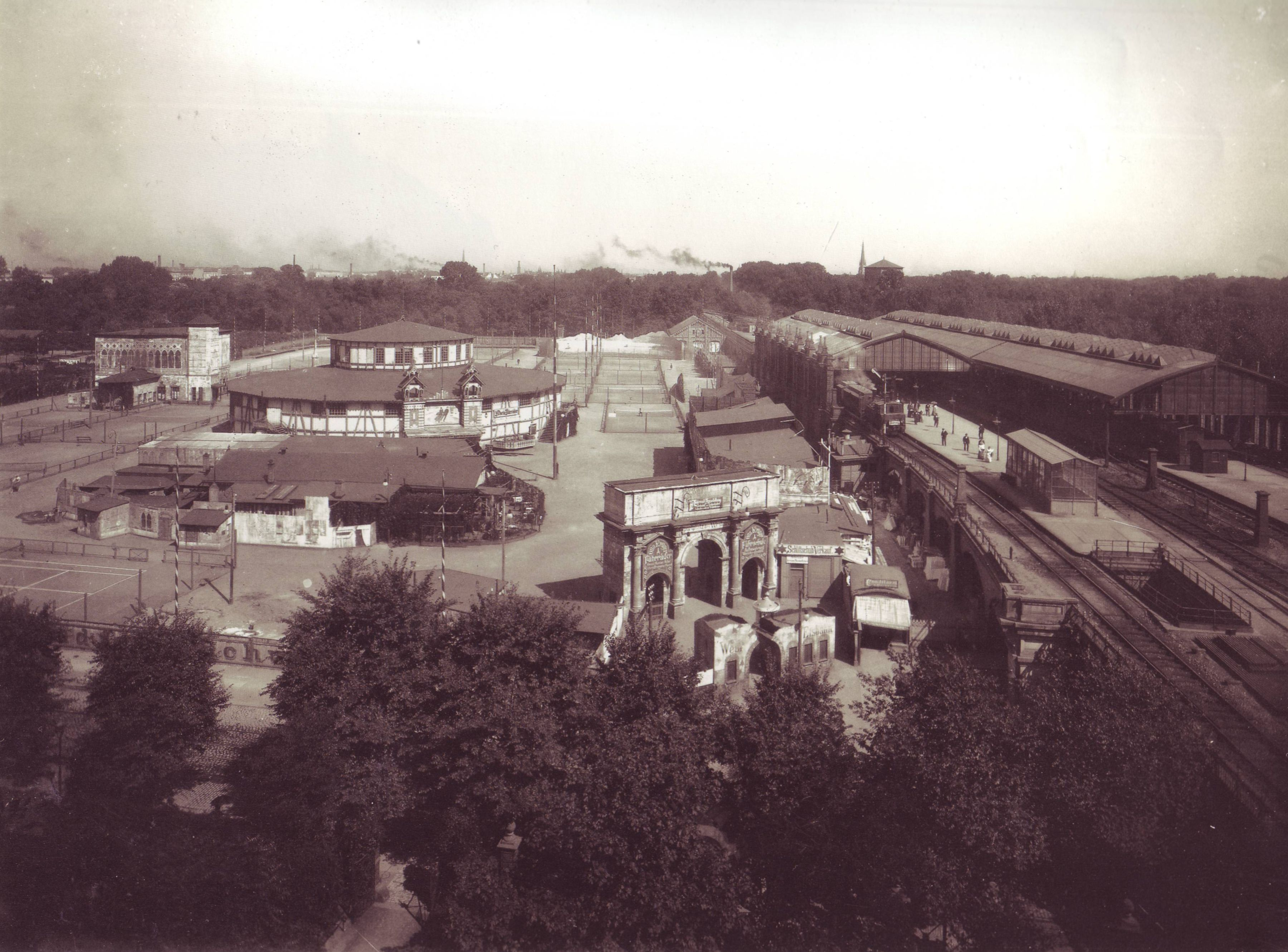 Berlin railway station Zoologischer Garten in 1898 mit West-Eisbahn, weitere Infos: [1]